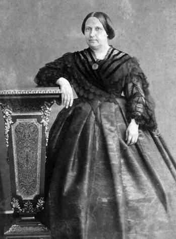 D. Teresa Cristina das Duas Sicílias (1822-1889), Imperatriz do Brasil.Teresa Cristina of the Two Sicilies, Empress of Brazil.